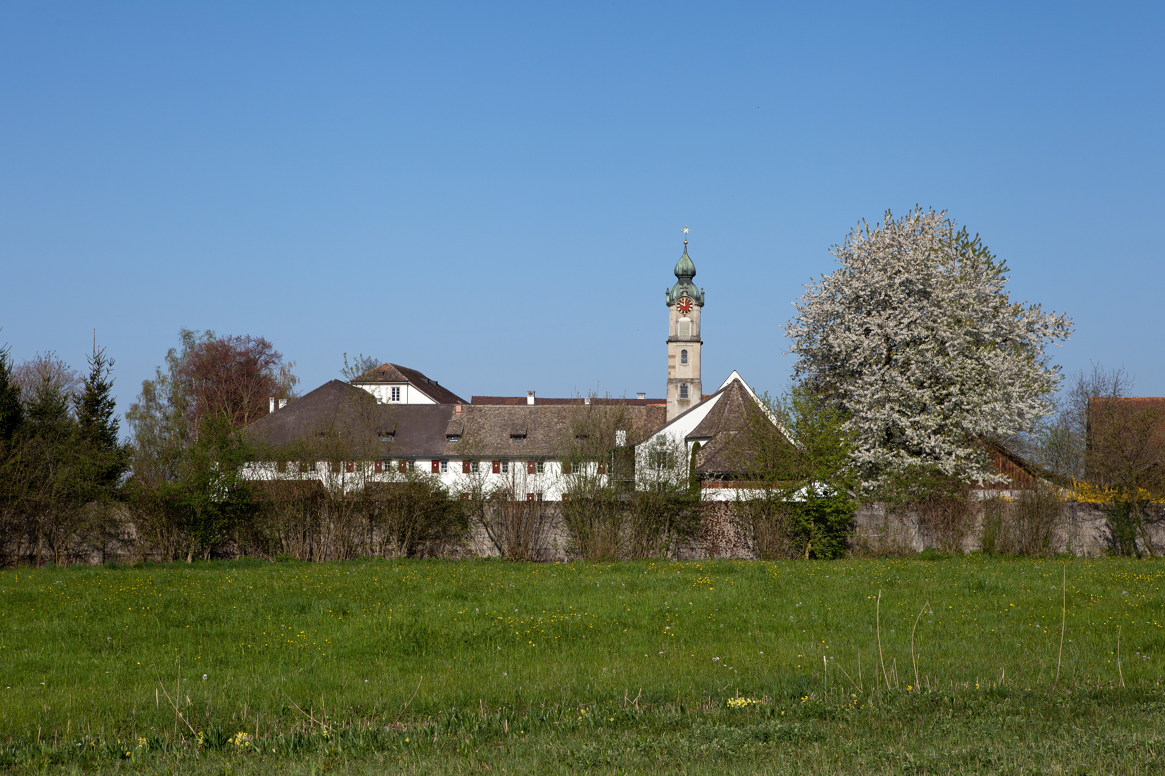 Zisterzienserinnenkloster Mariazell in Wurmsbach bei Rapperswil (Rapperswil-Jona) SG